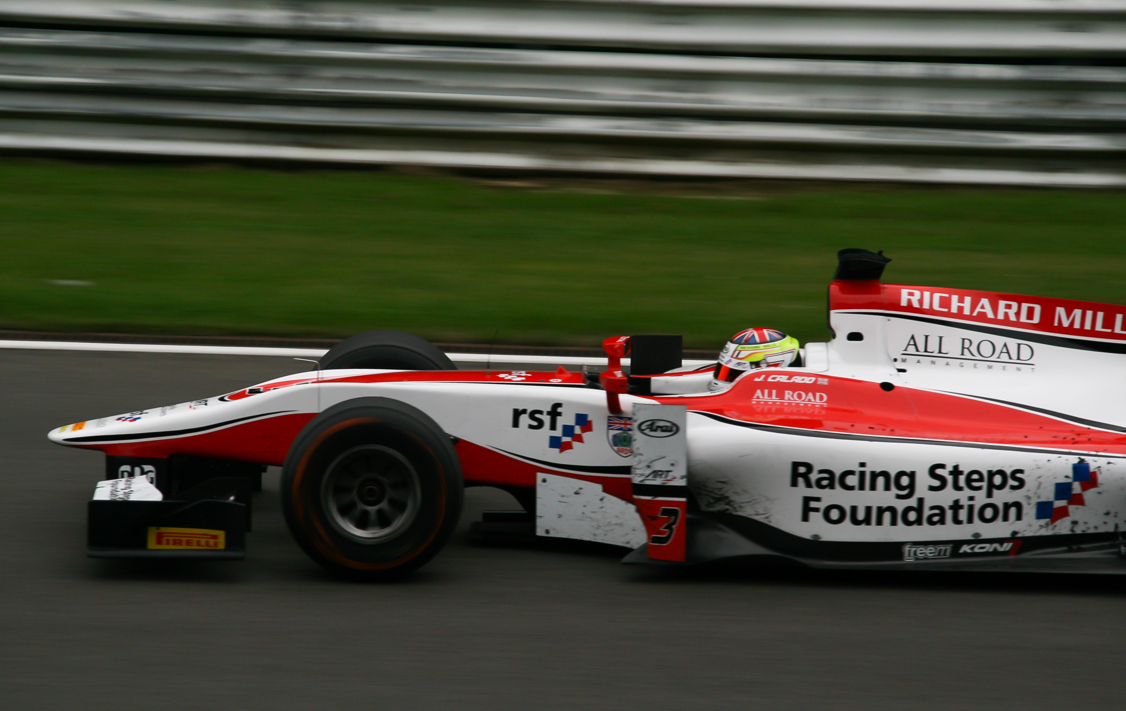 James Calado beim Hauptrennen im Belgien 2013